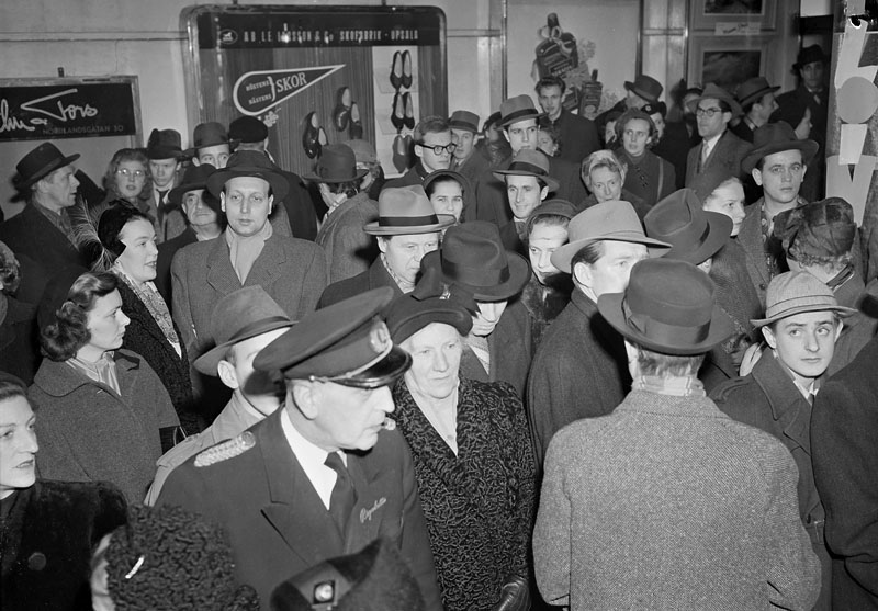 Kungsgatan 16-18, biografen Rigoletto, foajén. Folkträngsel under premiären av Chaplins film Rampljus (Limelight)